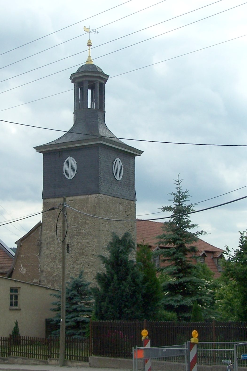 Teilansicht der Kirche.